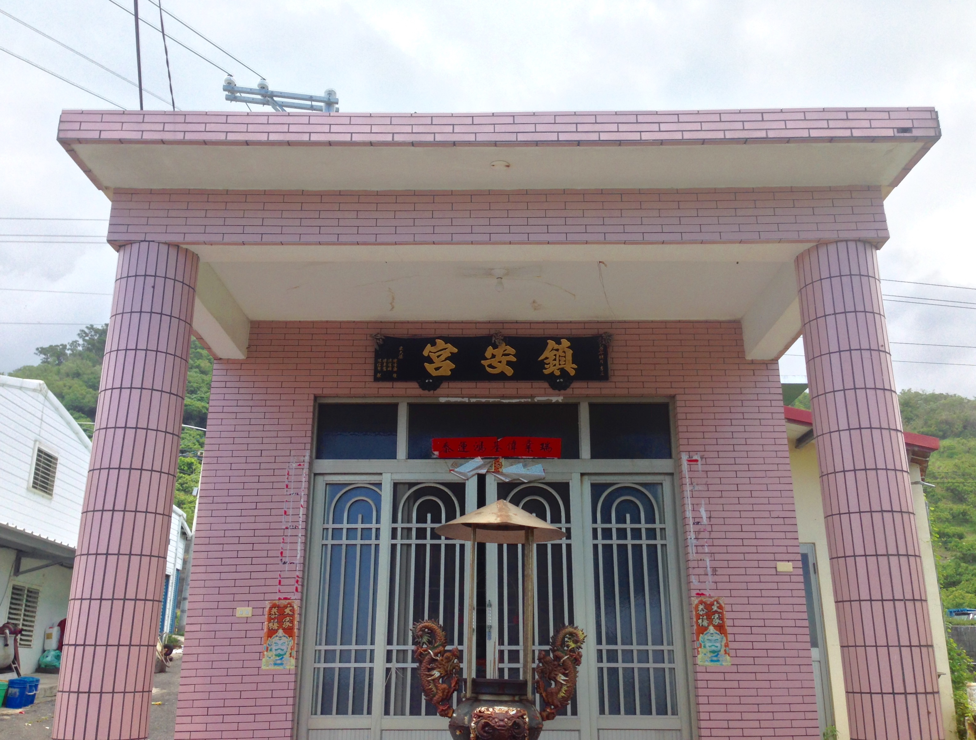 中文（台灣）: 王太帥鎮安宮為奉祀尊稱「白軍營主帥王大人」的王開俊。